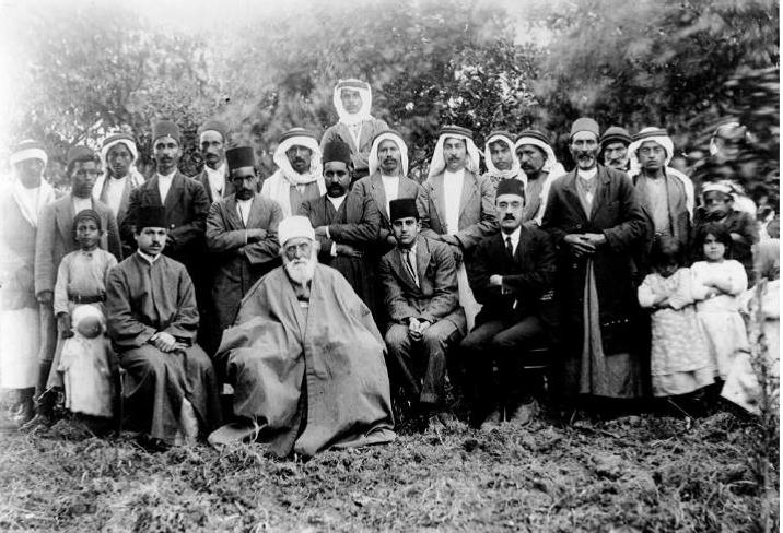 עבדול בהאא מבקר בעדסייה